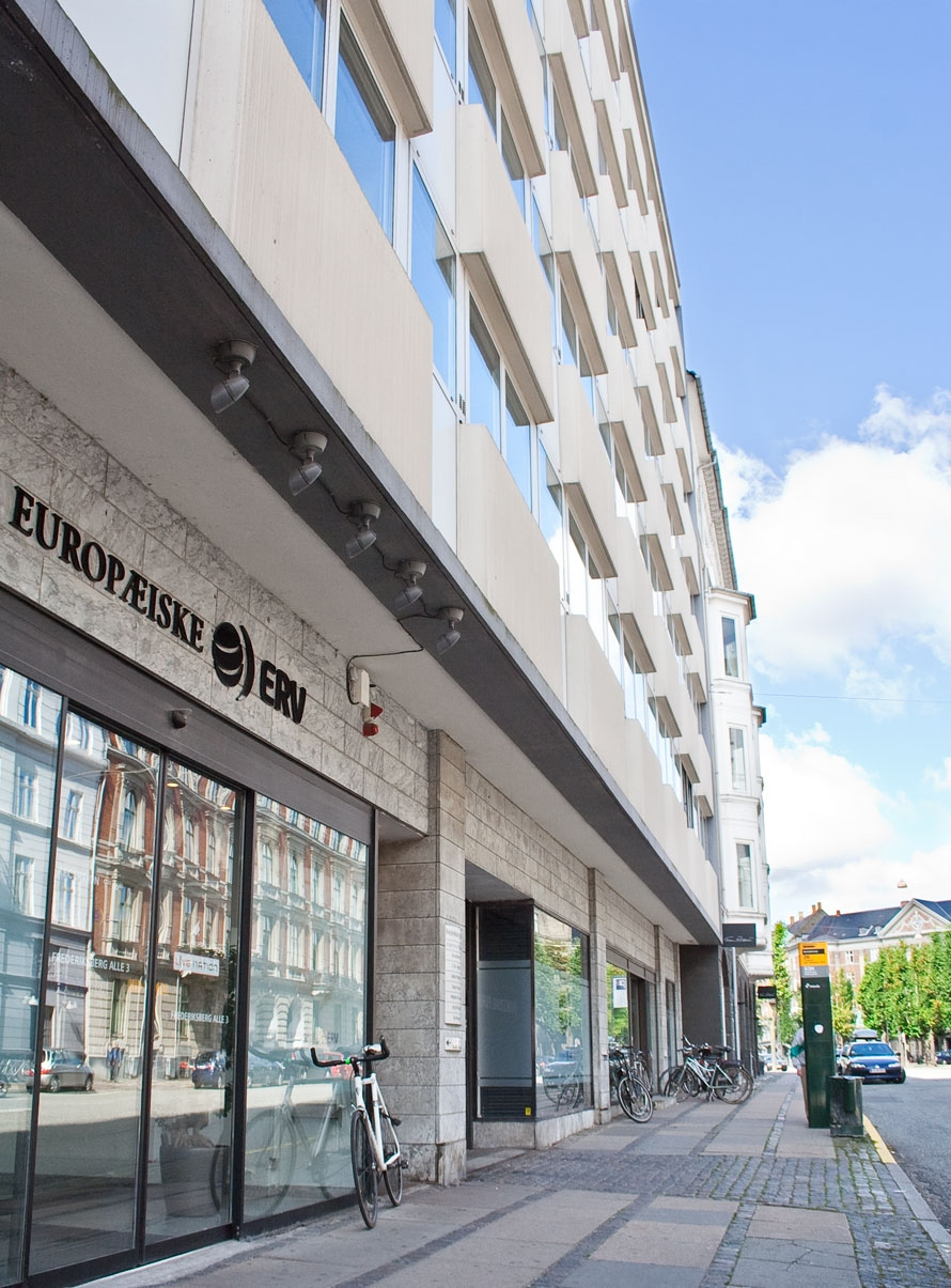 Billede af Europæiske ERVs facade på Frederiksberg Allé 3.